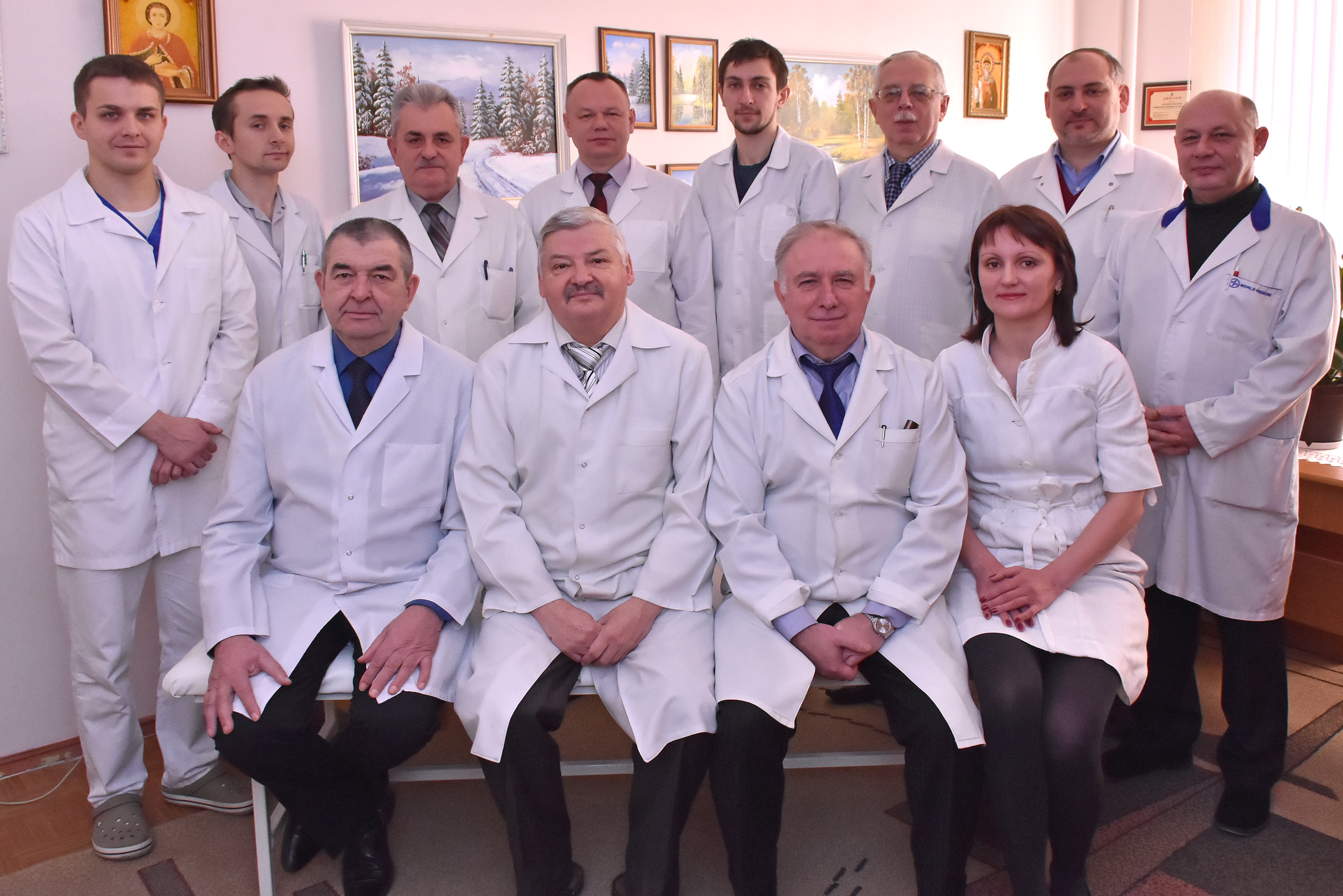 Катедра хірургії Навчально-наукового інституту післядипломної освіти Тернопільського державного медичного університету імені І. Я. Горбачевського, 26 січня 2016.Сидять (зліва направо): професор Володимир Бігуняк, завідувач катедри, професор Ігор Дзюбановський, професор Володимир Гощинський, Любов Війтович; стоять: невідомий, невідомий, доцент Юрій Герасимець, доцент Роман Свистун, асистент Андрій Продан, доцент Володимир Бенедикт, доцент Костянтин Поляцко, доцент Володимир П’ятночка.